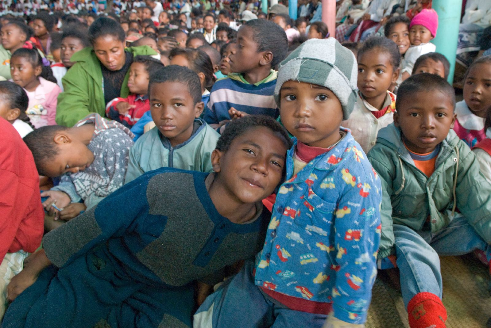 Akamasoa, Madagascar. Enfants à la messe du Père Pédro